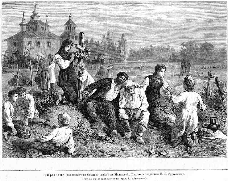 Поминание на Фоминой неделе. "Всемирная иллюстрация", №15, 1877.